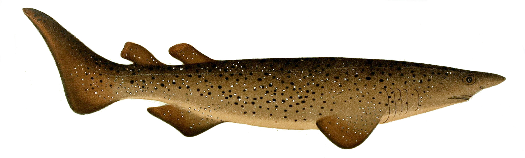 Echinorhinus brucus